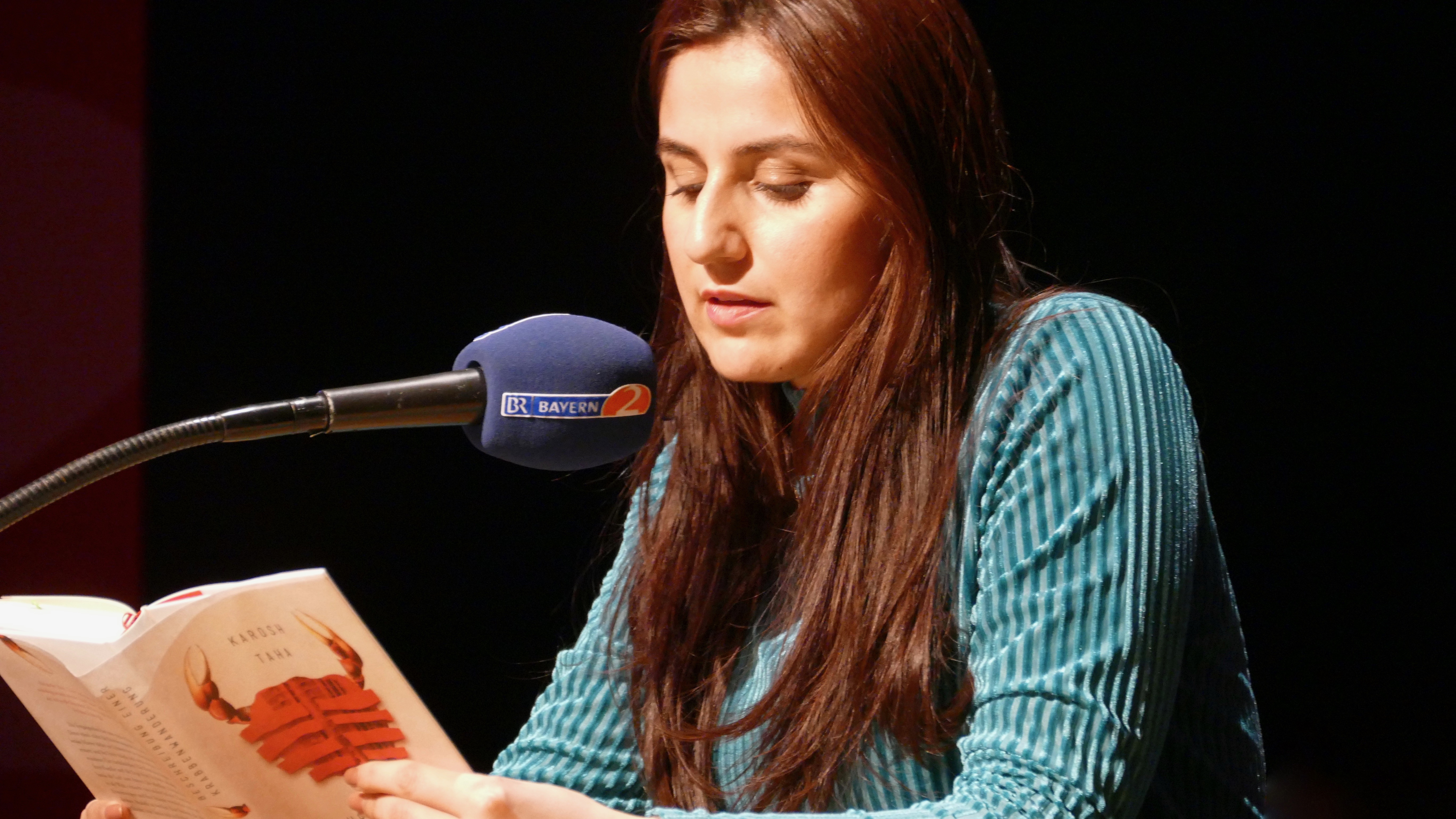 Karosh Taha bei den Wortspielen 2018 in München